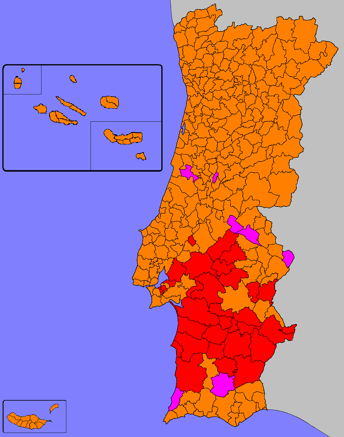 Mapa ilustrativo do partido mais votado por concelho